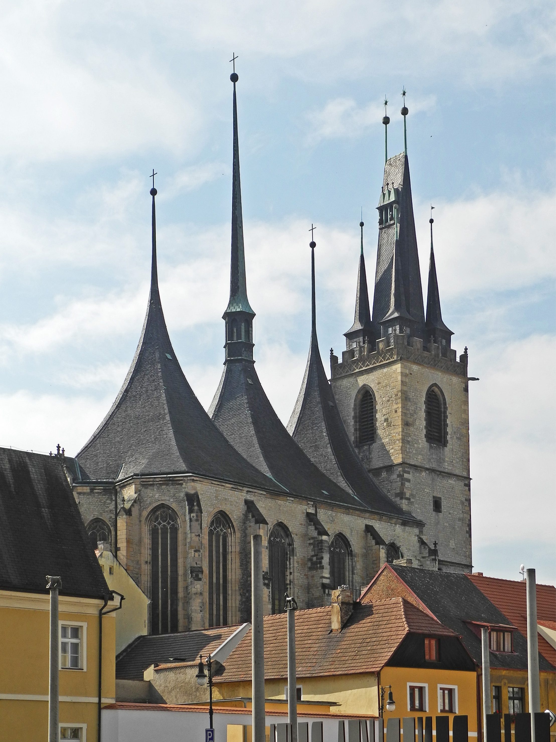 Kirche St. Nikolaus in Laun (Louny), letztes Werk von Benedikt Ried